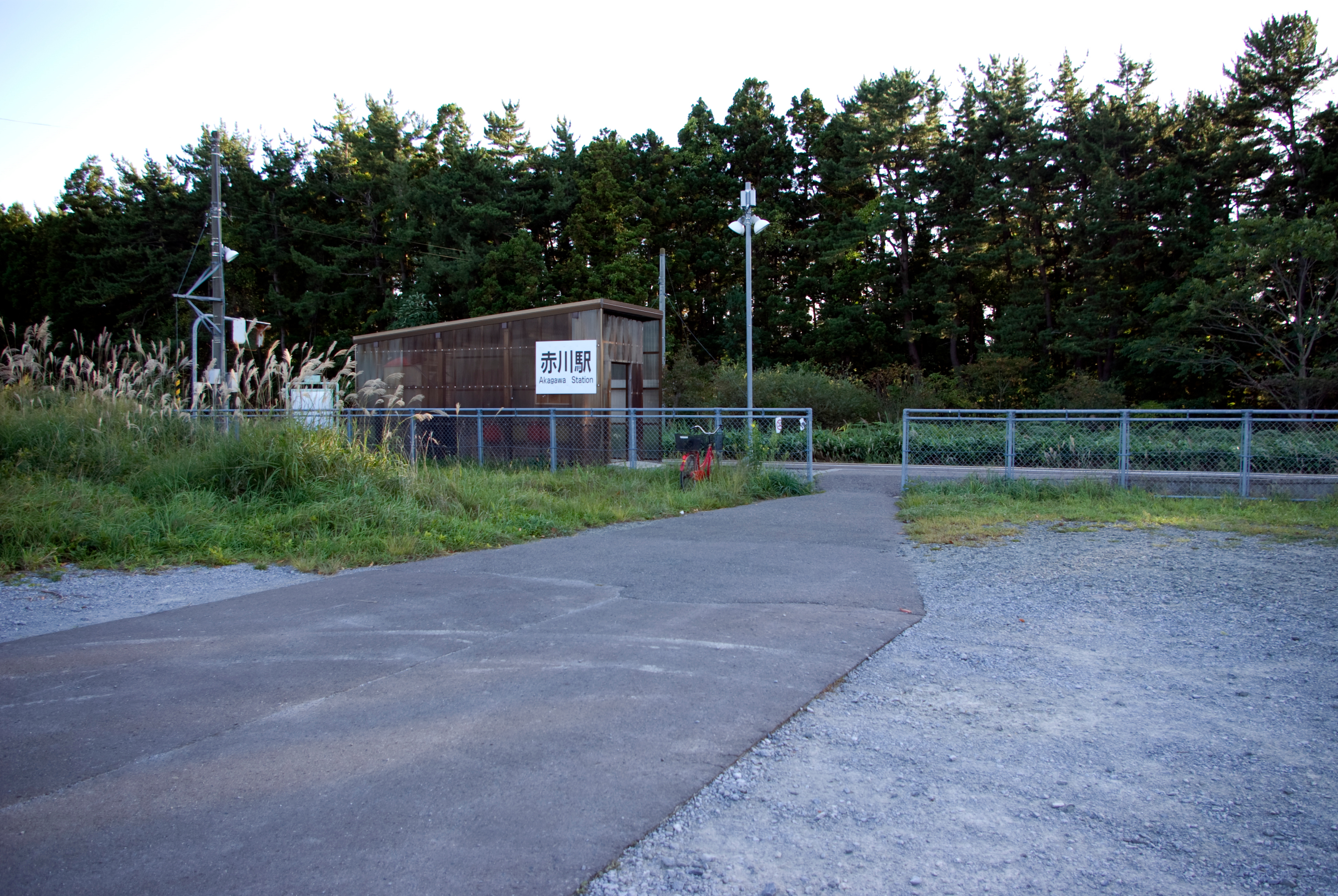 JR大湊線赤川駅